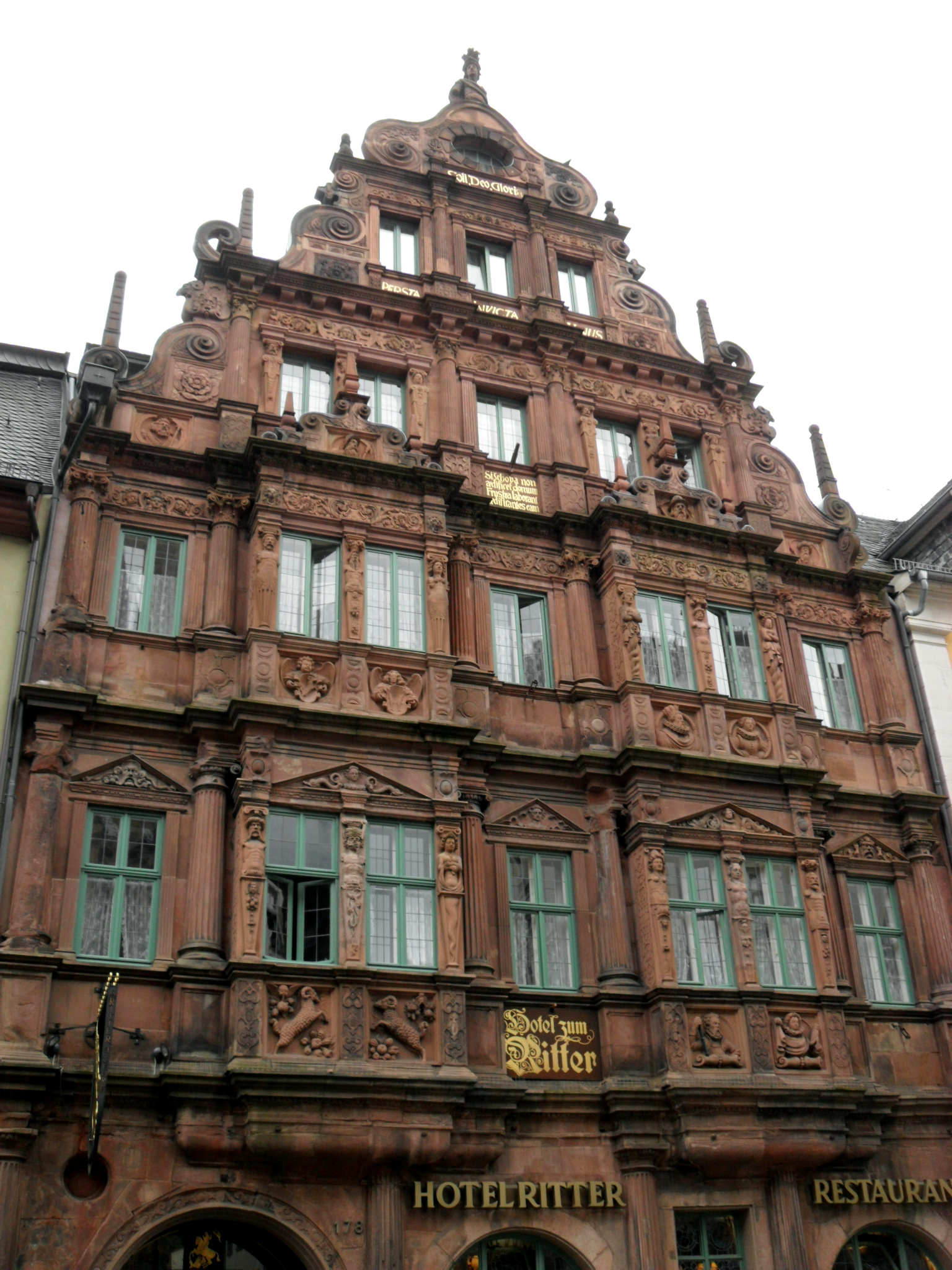 Ренессансное здание гостиницы "У рыцаря", на верхушке богато декорированного фасада которого видна фигура рыцаря.